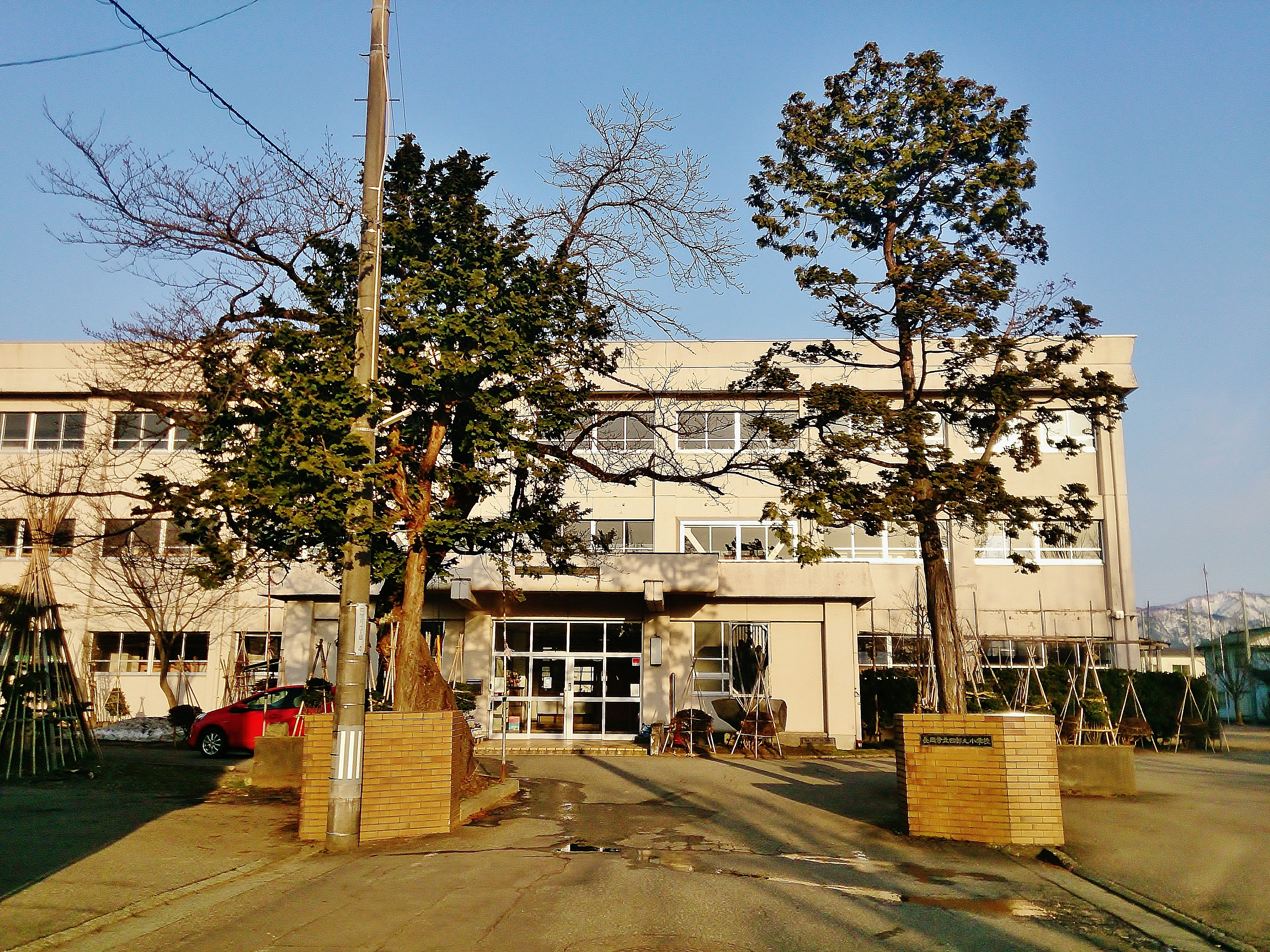 長岡市立 四郎丸小学校・新潟県 長岡市にて撮影